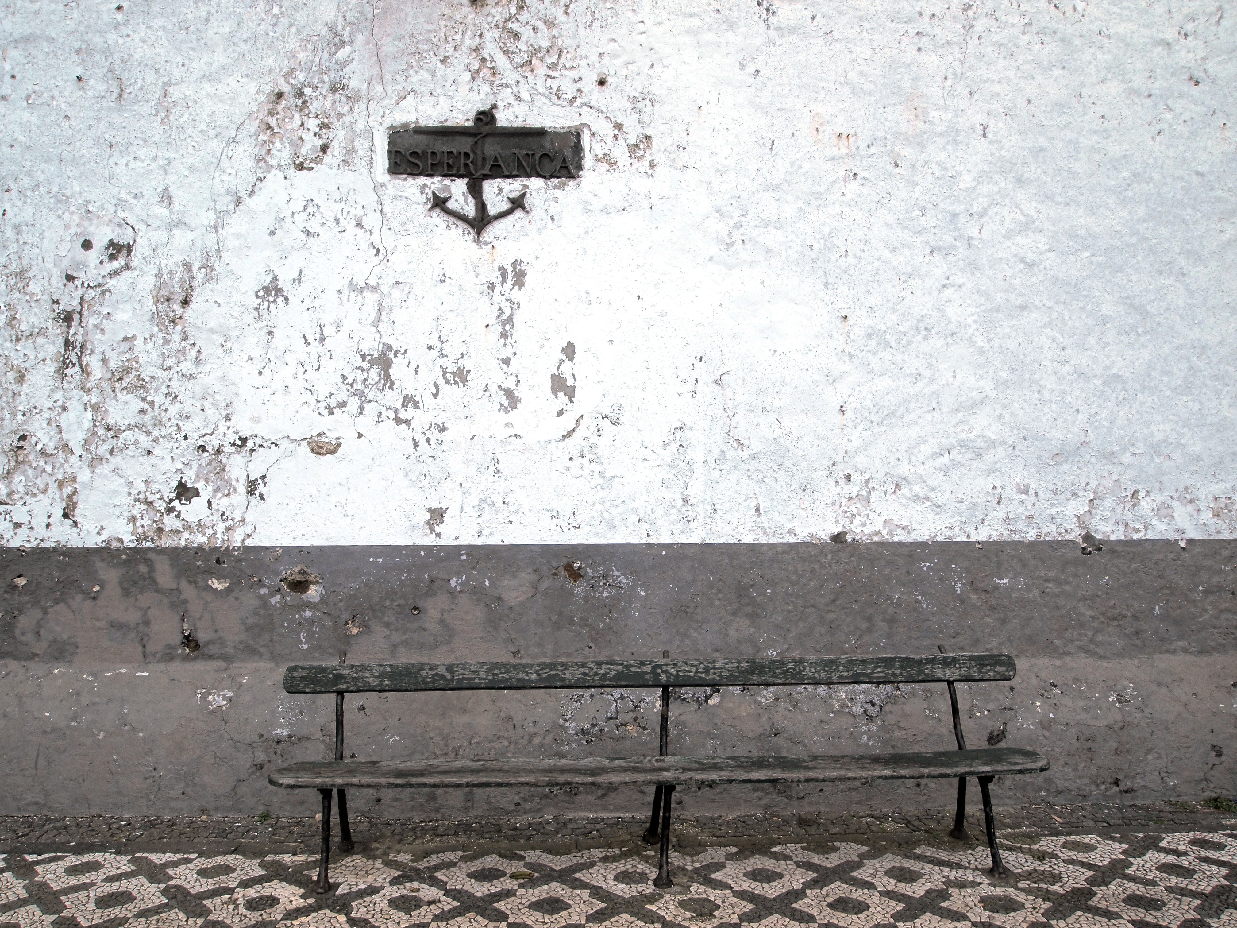 Banco de jardim no Campo de São Francisco, em Ponta Delgada, Açores, junto ao muro do Convento da Esperança onde está cravada uma placa metálica com a palavra "ESPERANÇA" e uma âncora. Dito ser o local de suicídio do escritor Antero de Quental, em 1891.(fonte)